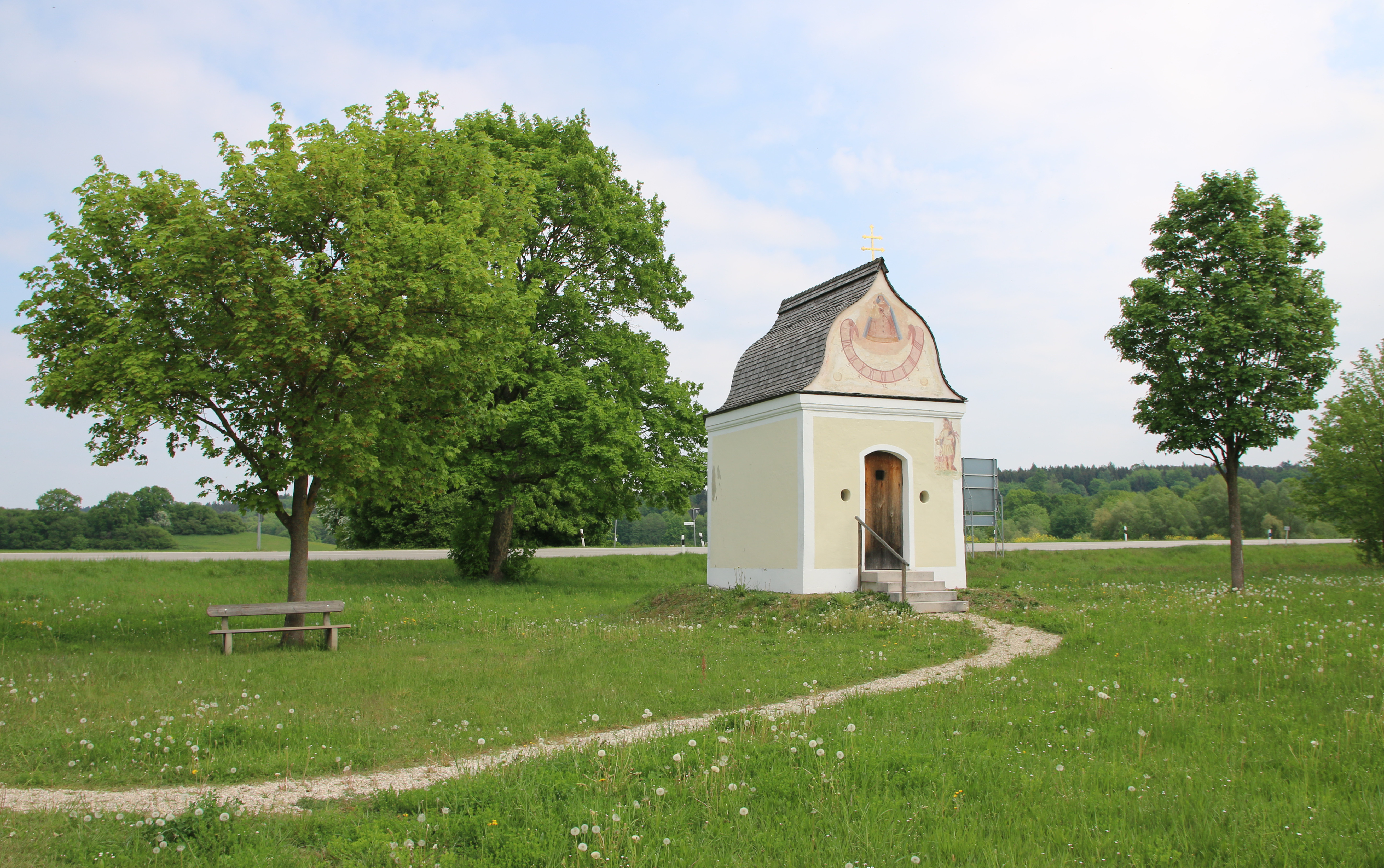 Kleine Kapelle am Ostrand von Helfenbrunn bei Freising.